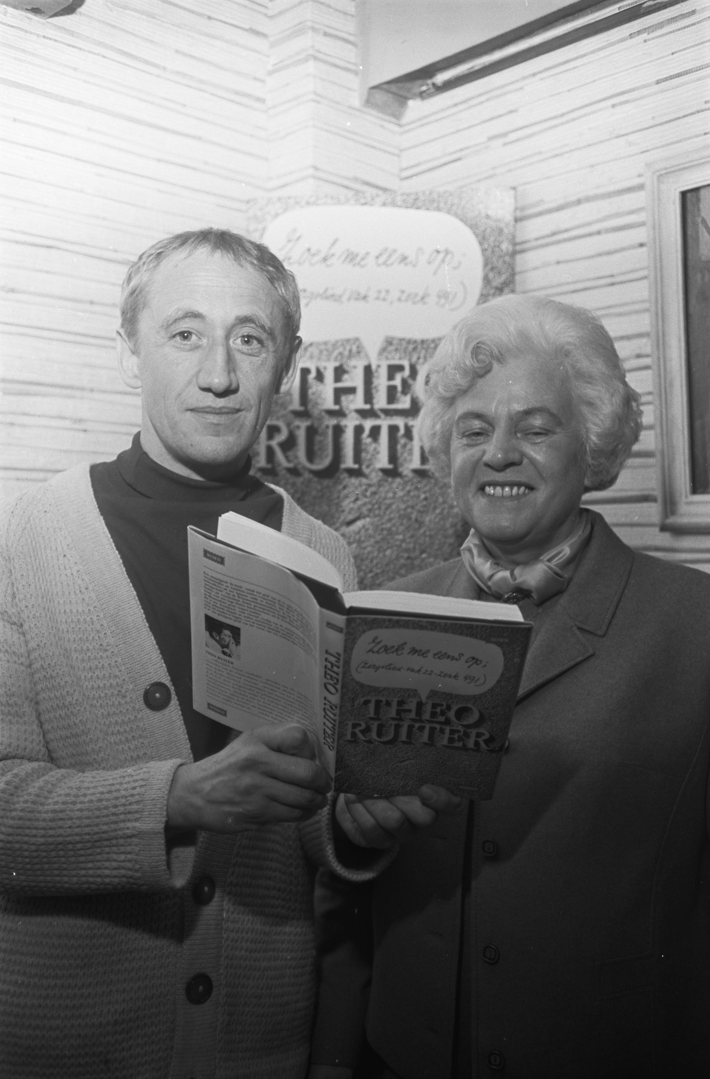 Boek over Theo Ruiter verschenen (Zoek me eens op) Mevrouw Ruiter en schrijver Yves van Domber. 6 november 1968